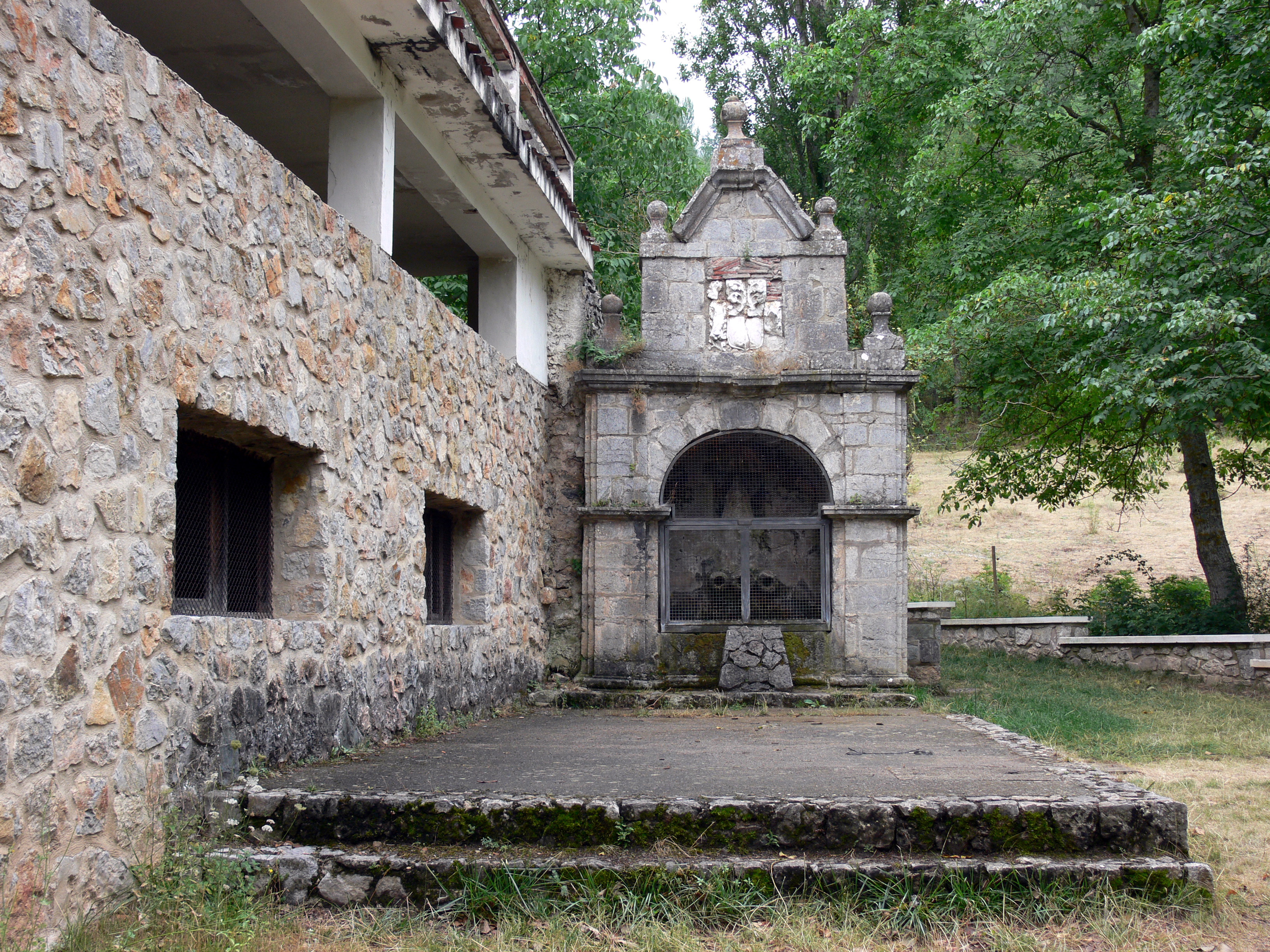 ANGUIANO. La fuente intermitente (sXVII).